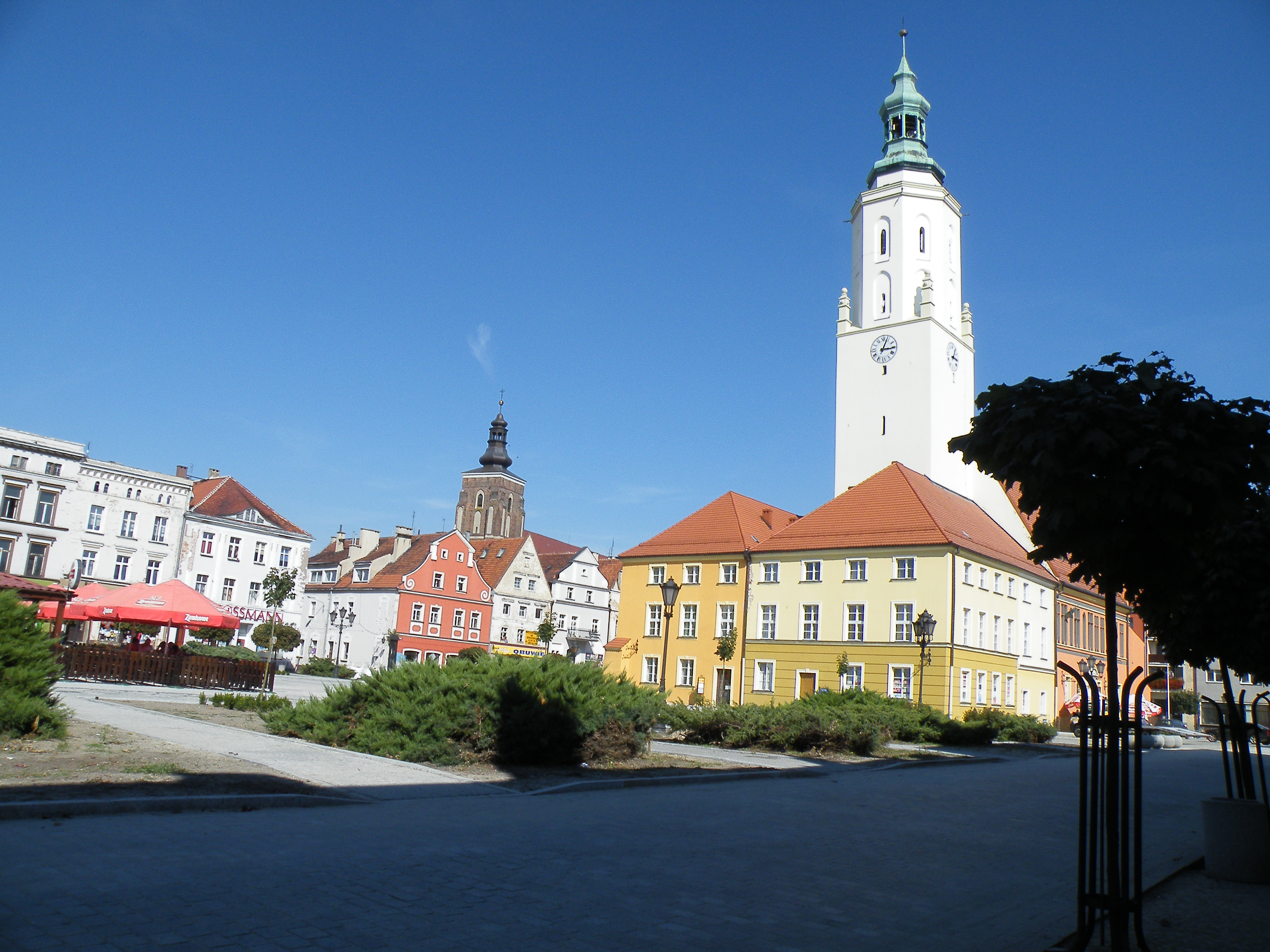 Namysłów, ratusz, 1374-1378, XV, XIX